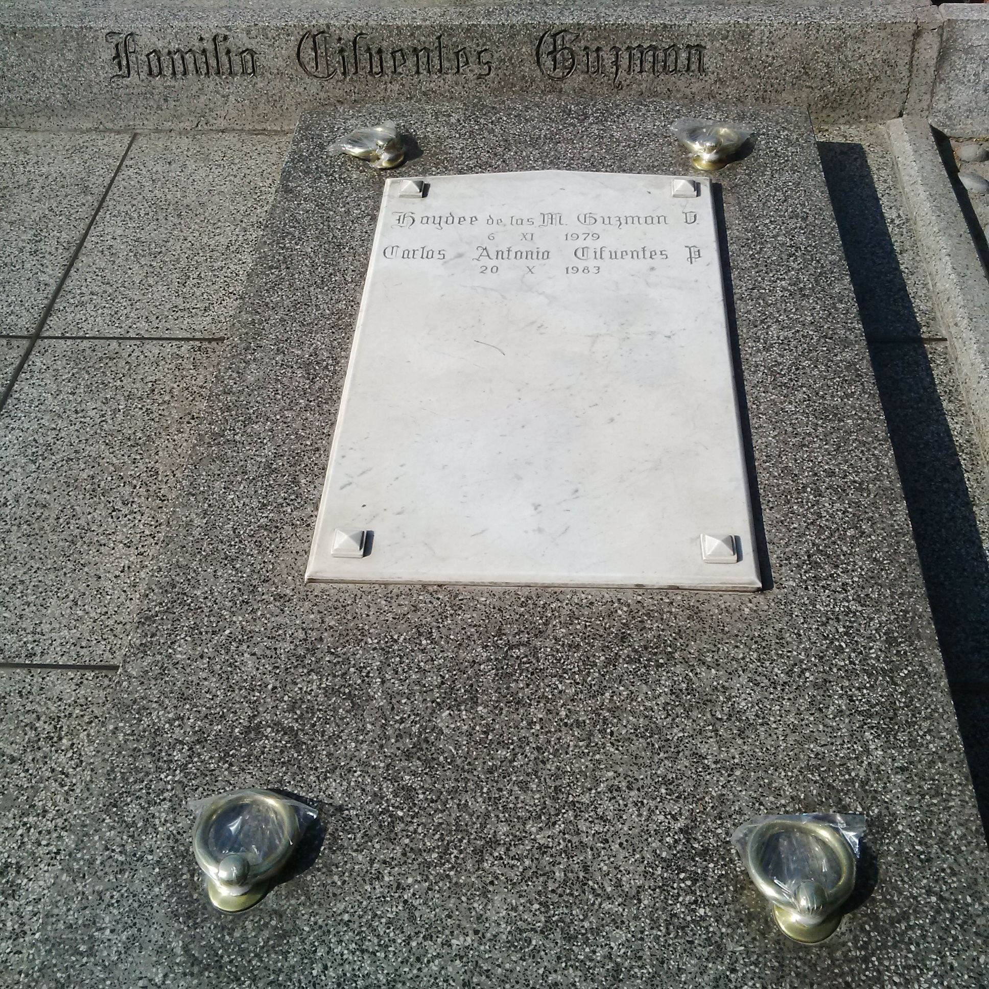 Sepulcro del Religioso mormón Carlos A. Cifuentes y su esposa Haydee Guzmán. Lat, Long (DDD) -33.530029700, -70.680045800 Lat, Long (DMM) -33° 31.801782', -70° 40.802748' Lat, Long (DMS) 33° 31' 48.1069" S, 70° 40' 48.1649" W Dirección o lugar PG1152 - Parada 4 / Cementerio Metropolitano, La Cisterna, Región Metropolitana de Santiago de Chile, Chile